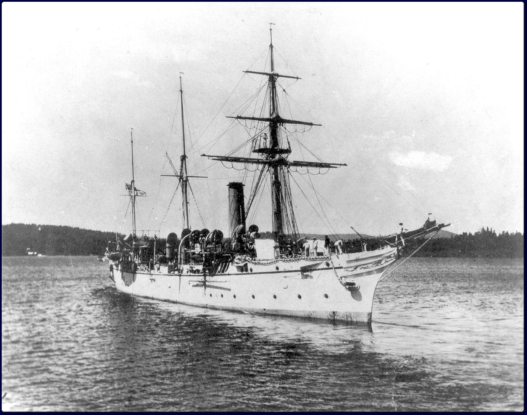 Phoenix class sloop HMCS ALGERINE at Esquimalt, BC, Canada.